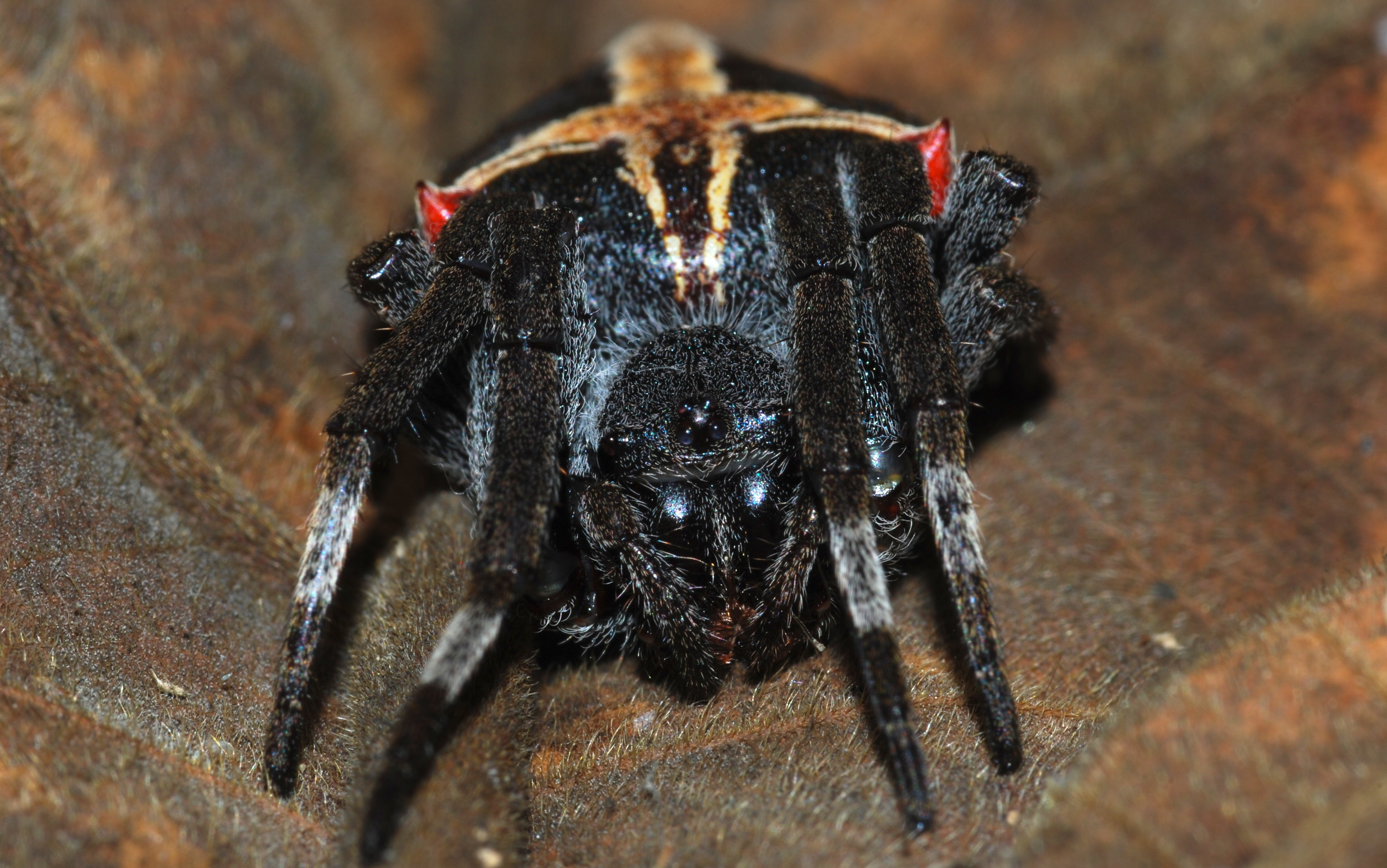 Taman Negara NP, Pahang, MALAYSIA